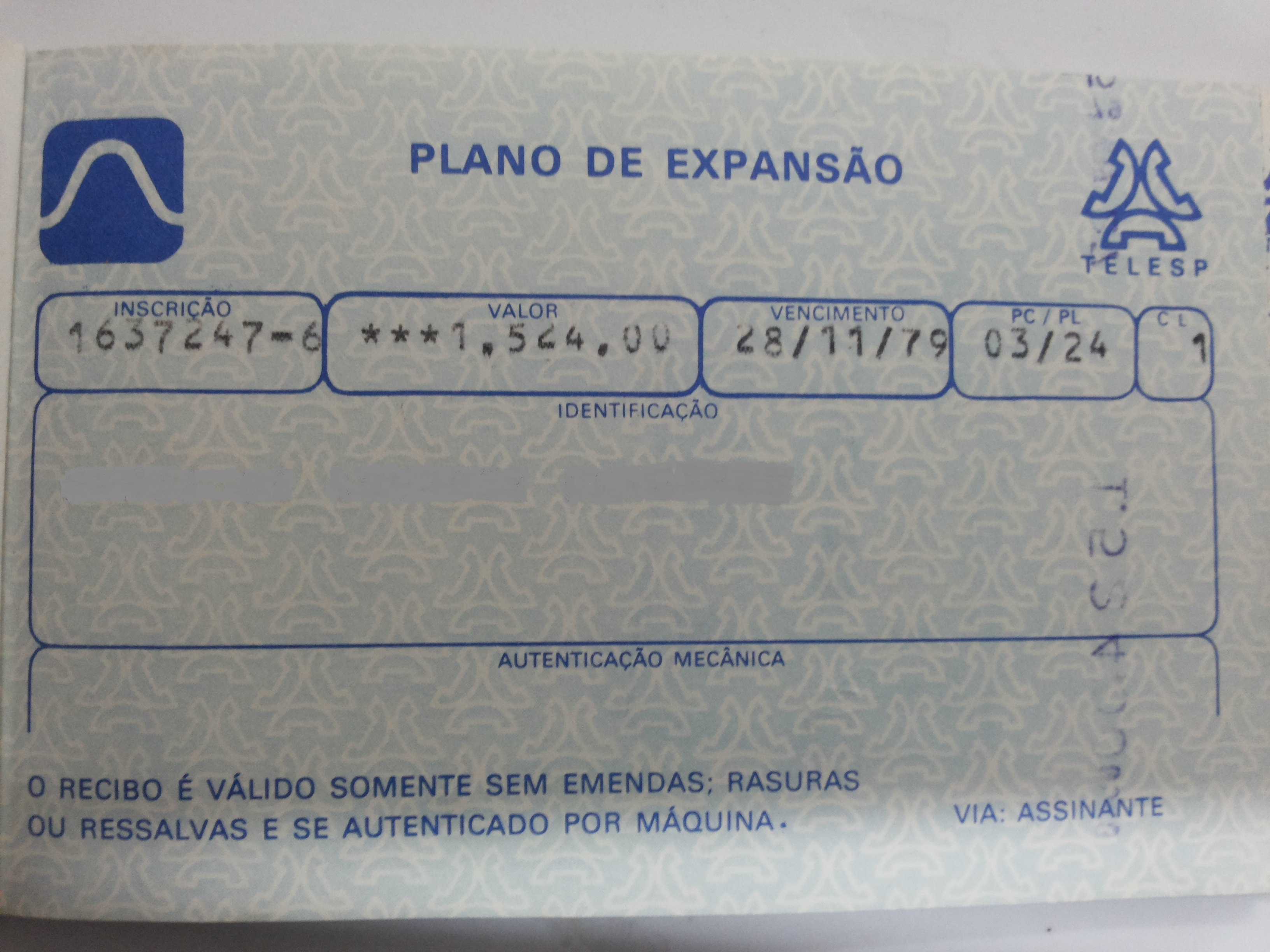 Plano de Expansão Telesp - final da década de 70